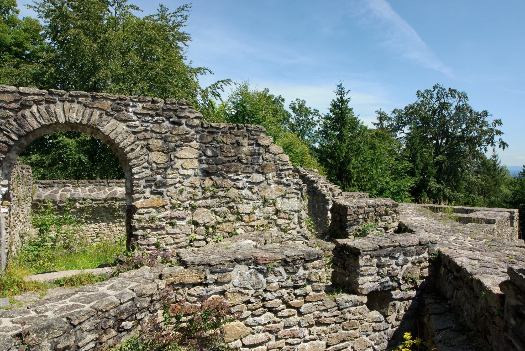 Ruiny starého hradu Altnußberg, Bavorsko